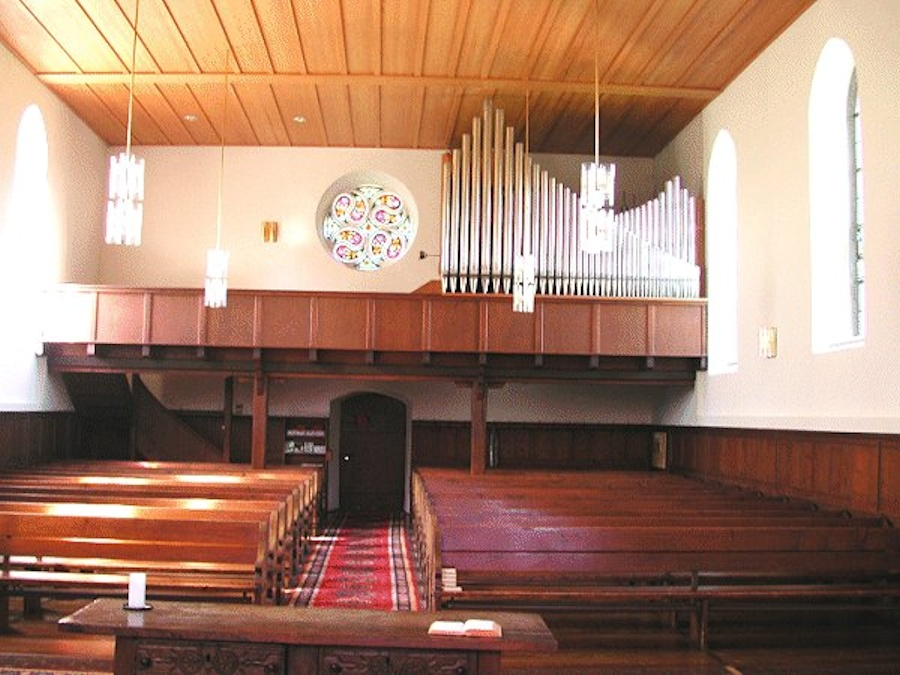 Orgel_Kirche_Densbüren.jpeg